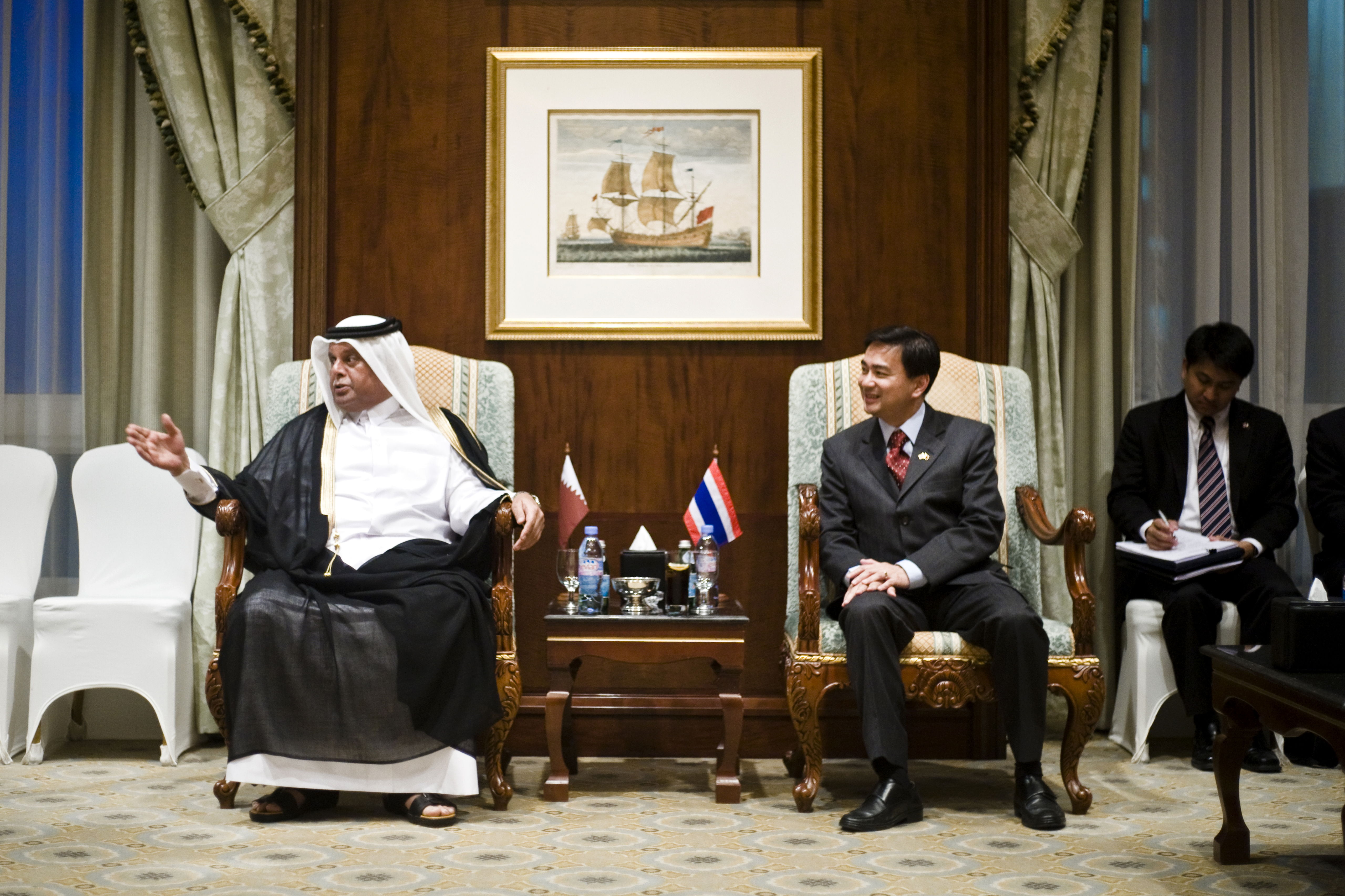 นายกรัฐมนตรีและคณะ ณ รัฐการ์ตาเพื่อเยือนอย่างเป็นทางการ ระหว่างวันที่ 24-26 พฤศจิกายน 2552 25พฤศจิกายน2552 (The Official Site of The Prime Minister of Thailand Photo by พีรพัฒน์ วิมลรังครัตน์)